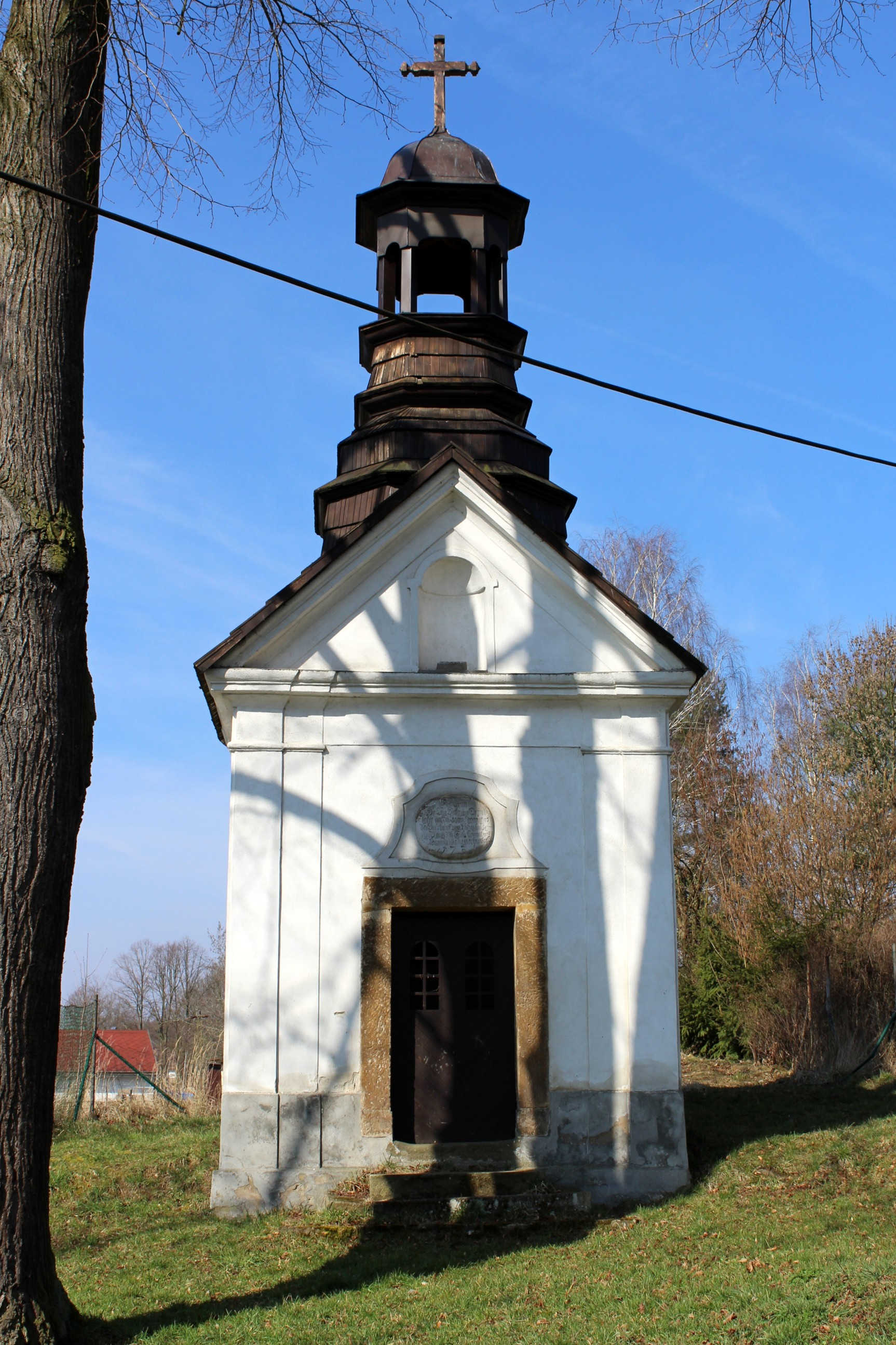 Postřelná